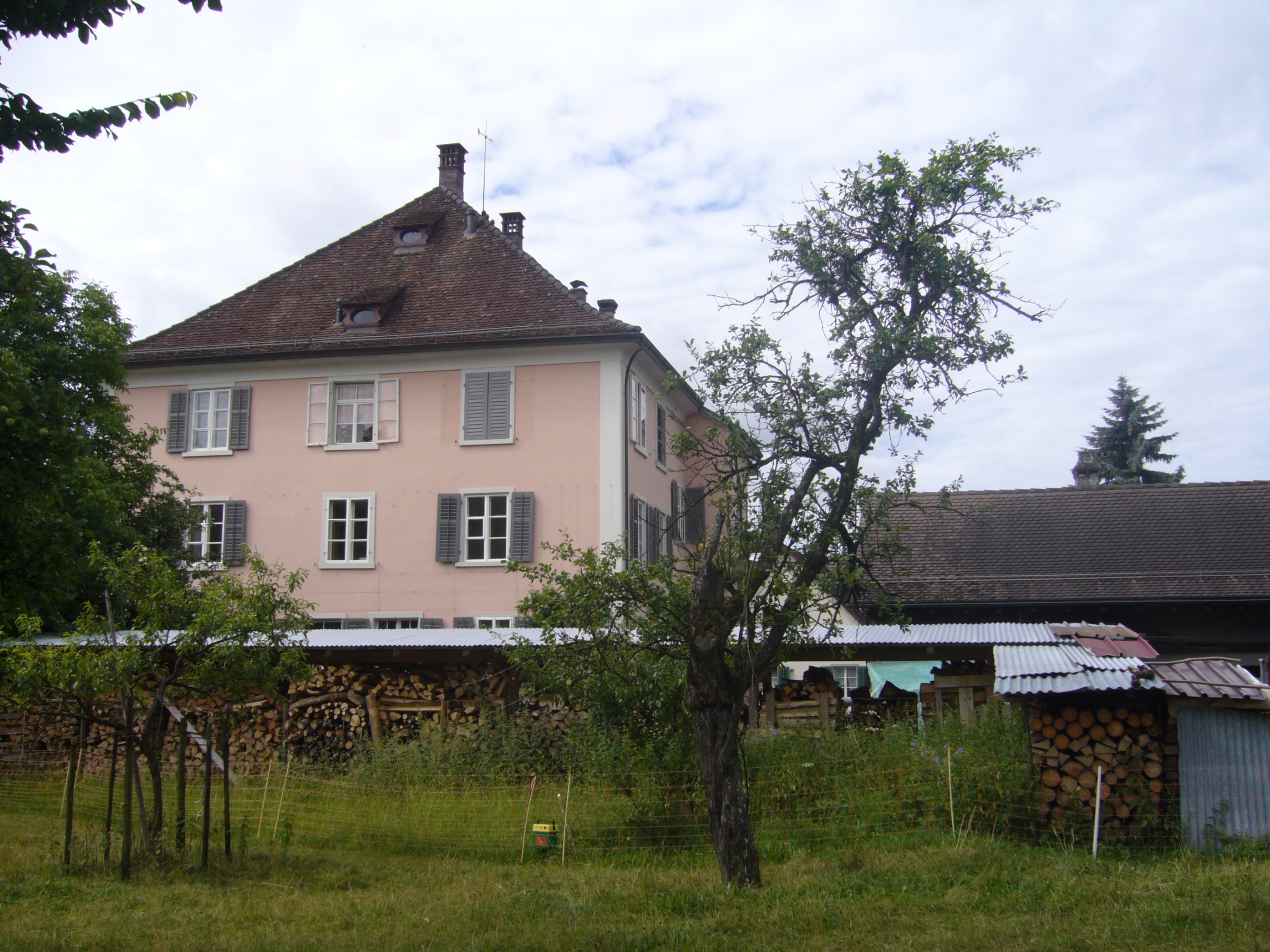 Ehemaliger Gasthof zum Adler von Nordosten aus gesehen.